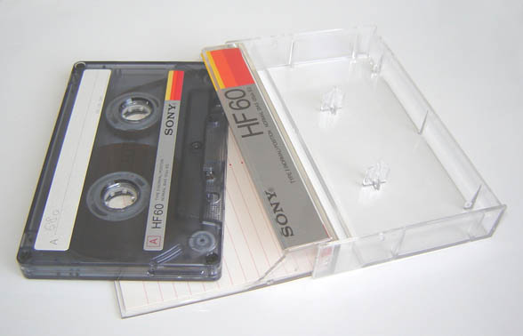 compact audio cassette, normal Fe I tape, Sony